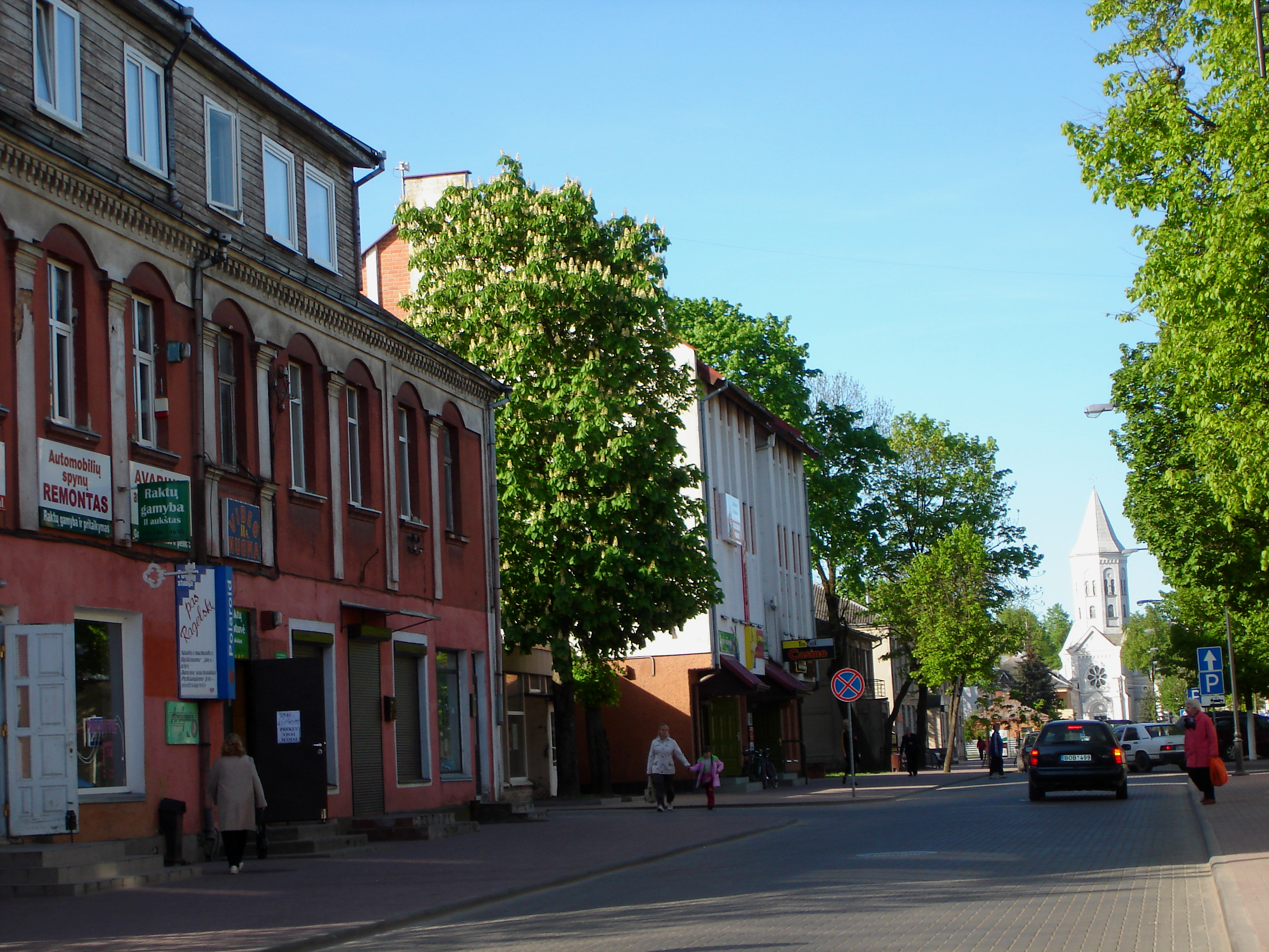 Litauen: Innenstadt von Tauragė